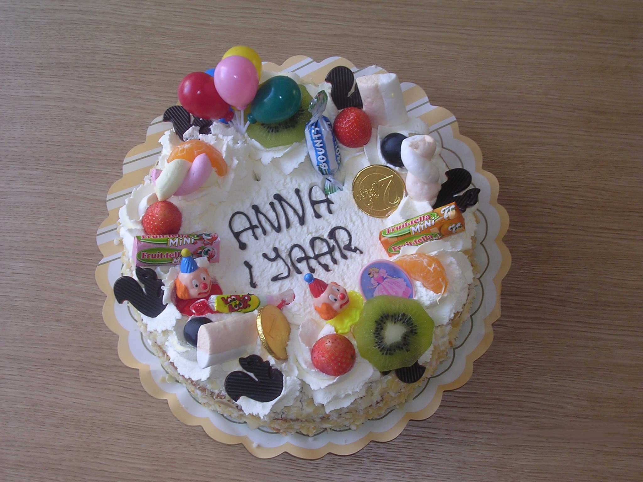 Birthdaycake